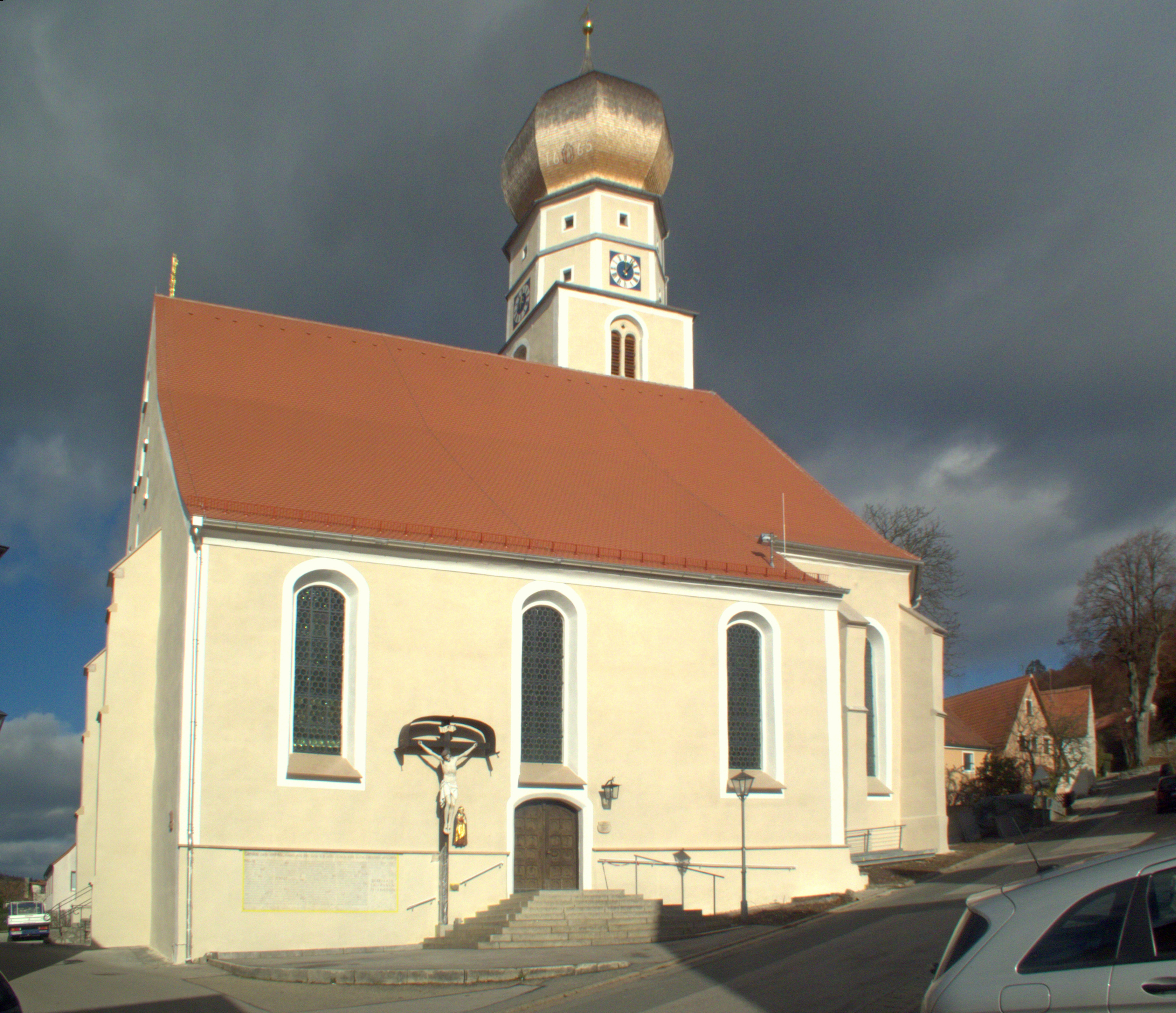 Die Pfarrkirche St. Johann Baptist in der Oberpfälzer Kleinstadt Velburg